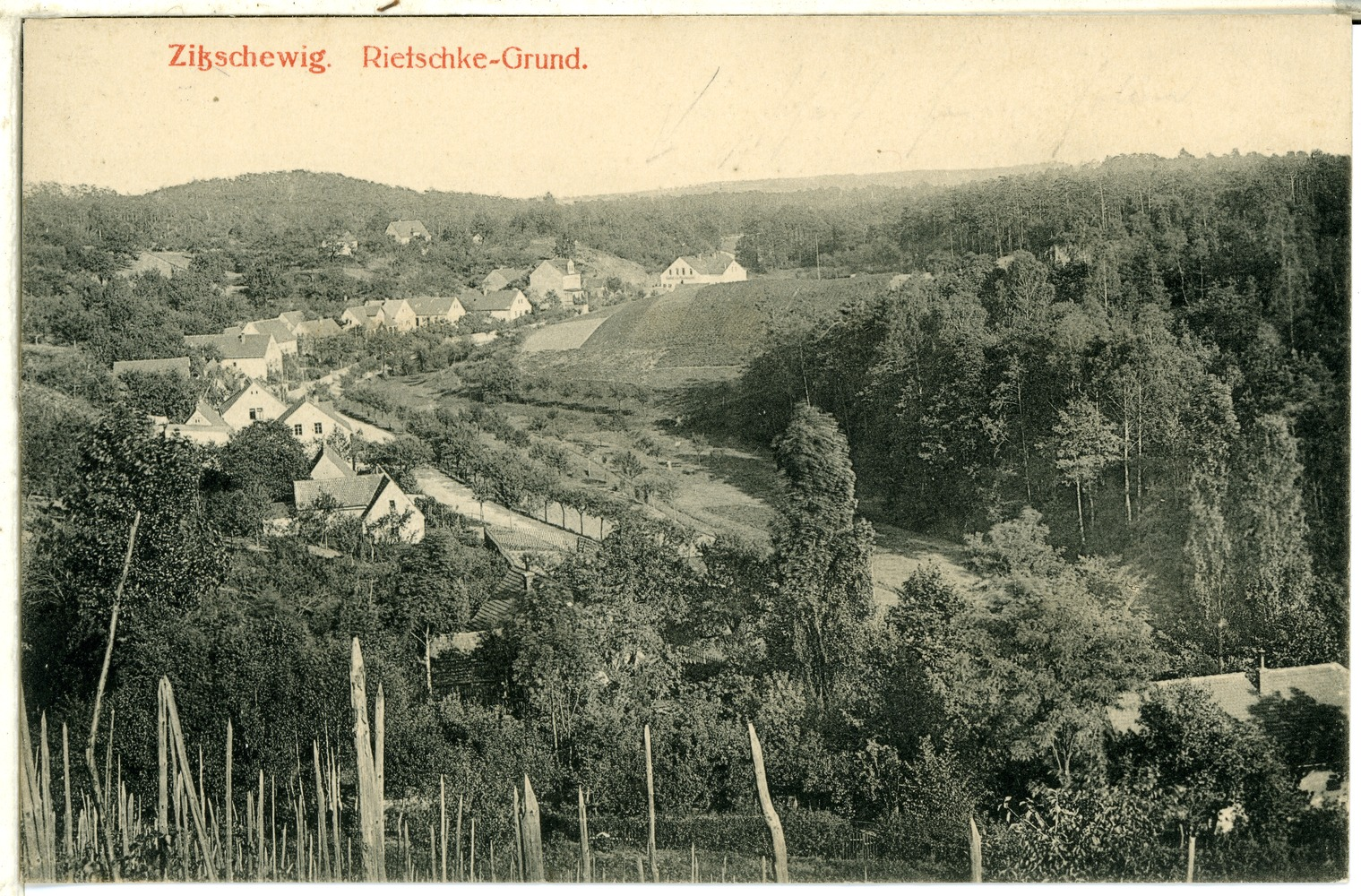 Zitzschewig; Rietschke-Grund This postcard is from publisher Brück & Sohn in Meißen ( postcard has a unique number 01027 and is available in a higher resolution at the publisher. This images was uploaded in a cooperation project between Wikipedians and the publisher.